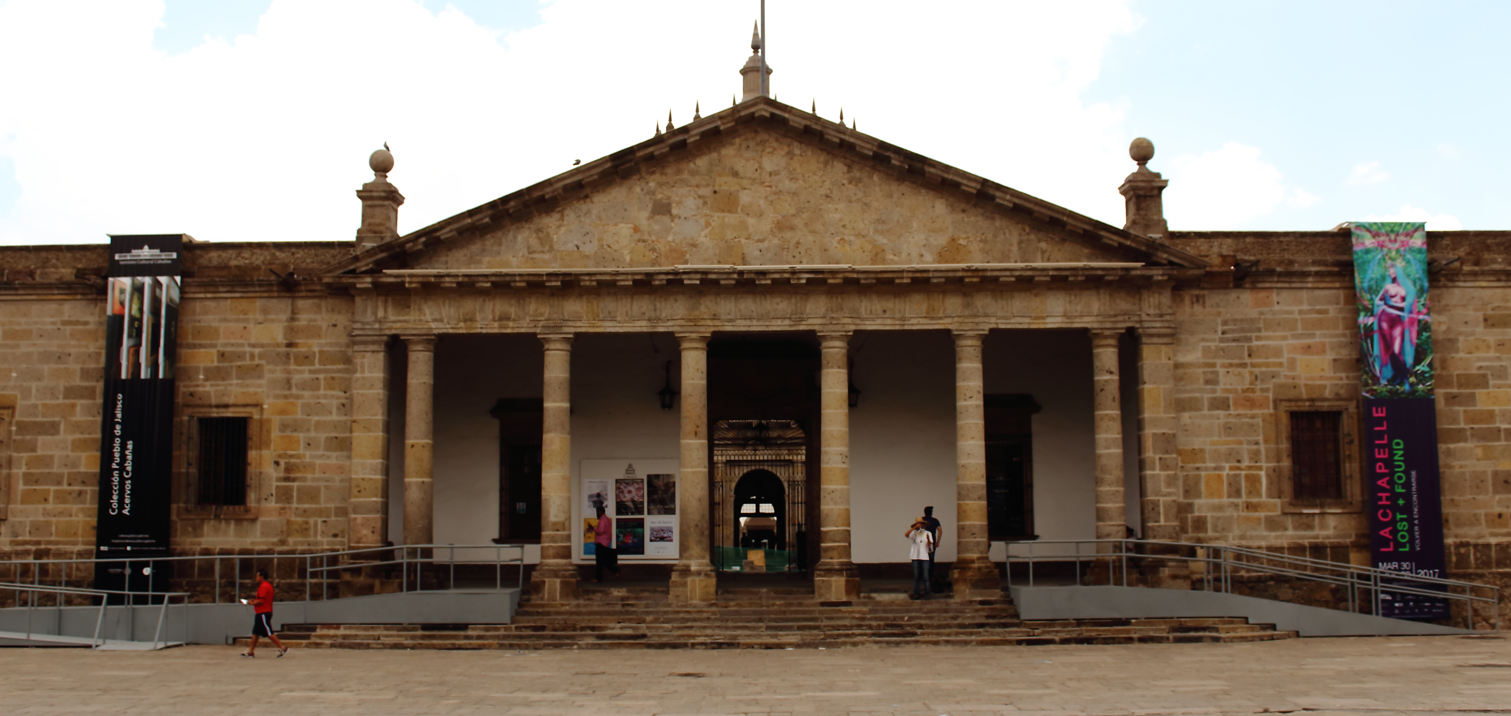 El Hospicio Cabañas es un edificio de estilo neoclásico, emblemático de la ciudad mexicana de Guadalajara. Sirvió como hogar de huérfanos de 1810 a 1980. En su interior se conservan algunos de los más importantes murales de José Clemente Orozco. Fue declarado en 1997 Patrimonio de la Humanidad por la Unesco. En la actualidad es la sede del Instituto Cultural Cabañas.